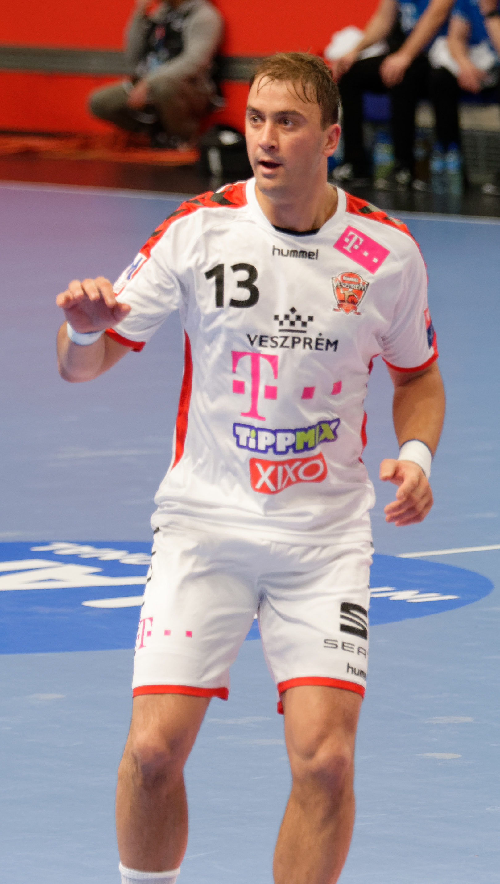 Rencontre de phase de groupe de la ligue des champions 2017/18 entre le PSG et Veszprem. A Coubertin, le 12 novembre 2017.